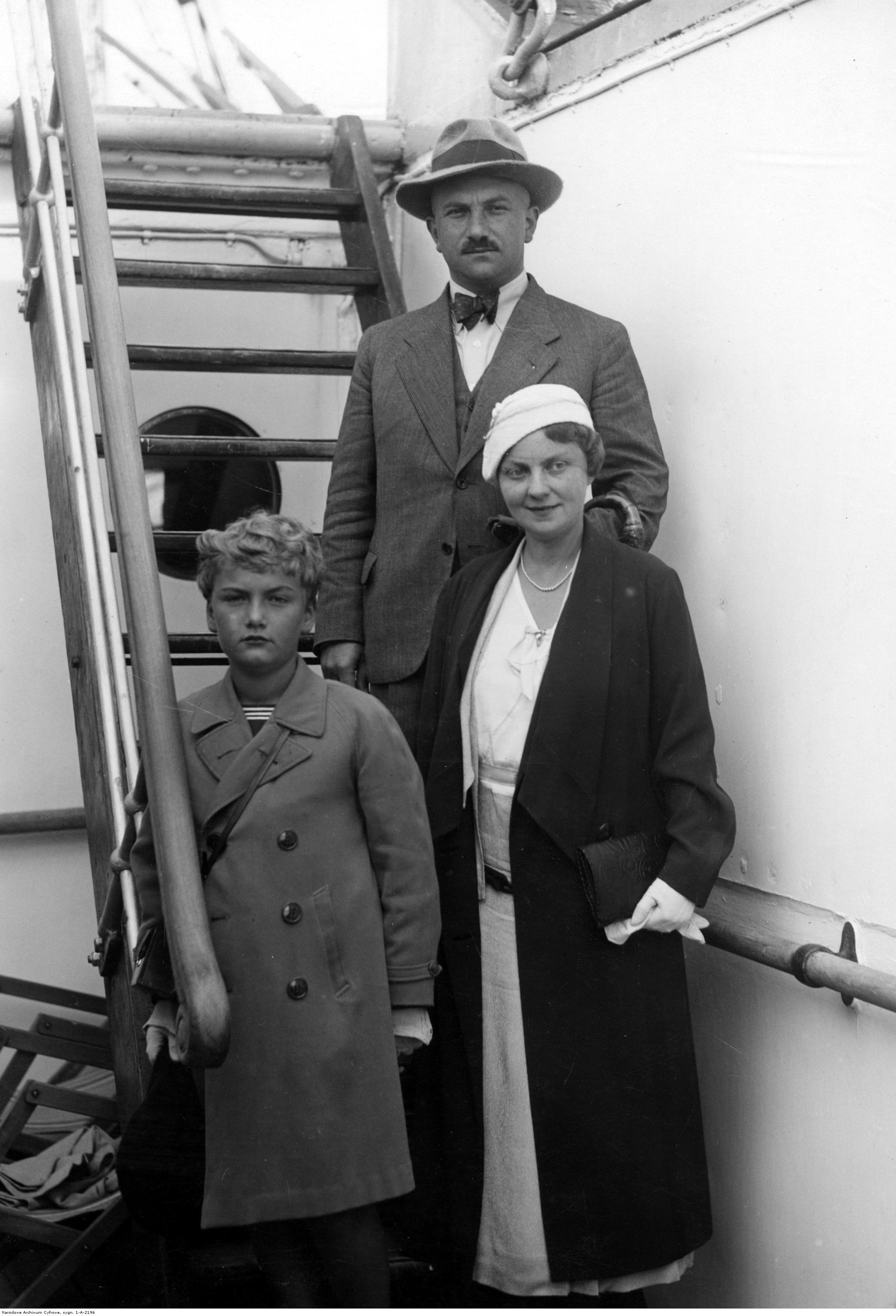 Ekonomista Czesław Peche (dyrektor Departamentu Górniczo-Hutniczego Ministerstwa Przemysłu i Handlu w latach 1931-1938) z żoną Anną Peche (córką Zofii Seidler, redaktorki czasopisma „Bluszcz” w latach 1906-1918) i synem. Zdjęcie wykonane na pokładzie statku „Kościuszko” w sierpniu 1933 roku.